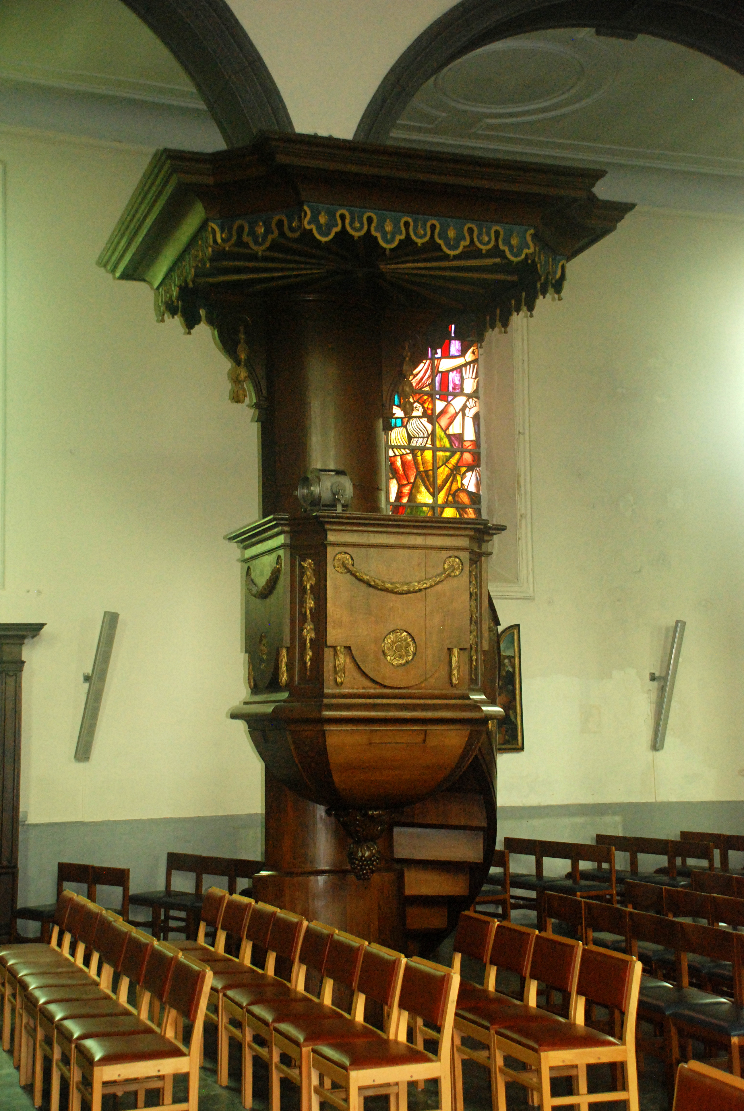 Belgique - Brabant wallon - Église de Court-Saint-Étienne